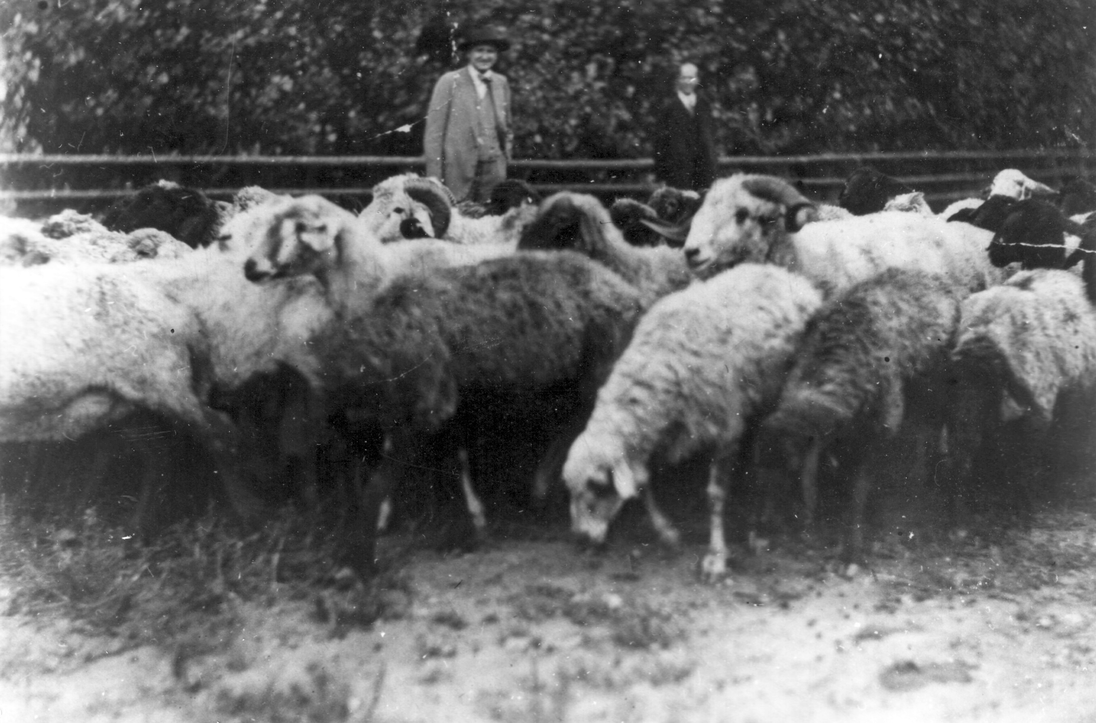 Original Schafherde aus der Buchara im zoologischen Garten zu Leipzig, 1930. Betreuer war ein Buchare, der neben der Herde in einem landesüblichen Zelt, einer Jurte, wohnte. Die Herde war aus Anlaß der IPA (Internationale Pelzfach Ausstellung) Leipzig 1930 (Mai-September) von der Sowjetunion zur Schau gestellte worden. Ursprünglich war sie bestimmt für den Pelztierpark der IPA. Dieser war auf dem Ausstellungsgelände der IPA errichtet worden (Leipziger Technische Messe am Völkerschlachtdenkmal). Aus seuchen-polizeilichen Gründen ist die Einfuhr von Schafen, Rindern etc. aus Innerasien infolge dort vorhandener Seuchenherde (Rinderpest, Schafpocken etc.) jedoch untersagt. Nur zoologische Gärten können solche Tiere aufnehmen (Quarantänestation!). Daher konnte die Herde im Leipziger Zoo Aufnahme finden. Sonst wäre die Einfuhr vom Reichsgesundheitsamt, Veterinär-Abteilung (Geheimrat Wehrle) nicht genehmigt worden. Die Verhandlungen wegen Ausstellung im Rahmen der IPA sind in Moskau mit der Sojuspushnina geführt worden durch die Herren Walter Krausse in Fa. Friedr. Erler, Vizepräsident der IPA und Dr. Paul Schöps. Im Bild (Hintergrund) links Dr. Paul Schöps, rechts Herr Laszlo Moskau, Delegierter einer Sowjetischen Außenhandelsorganisation. Begutachtet wurde die Herde u. a. von Ministerialrat Kürschner, Minister für Ernährung und Landwirtschaft, Berlin. Nach seinen Worten waren ganz erstklassige, selten schöne Tiere in der Herde vereint. Die Auswahl der Tiere ist seitens der russischen Experten daher mit grösster Sorgfalt vorgenommen wurden.undatierter, unsignierter Text, eventuell Paul Schöps